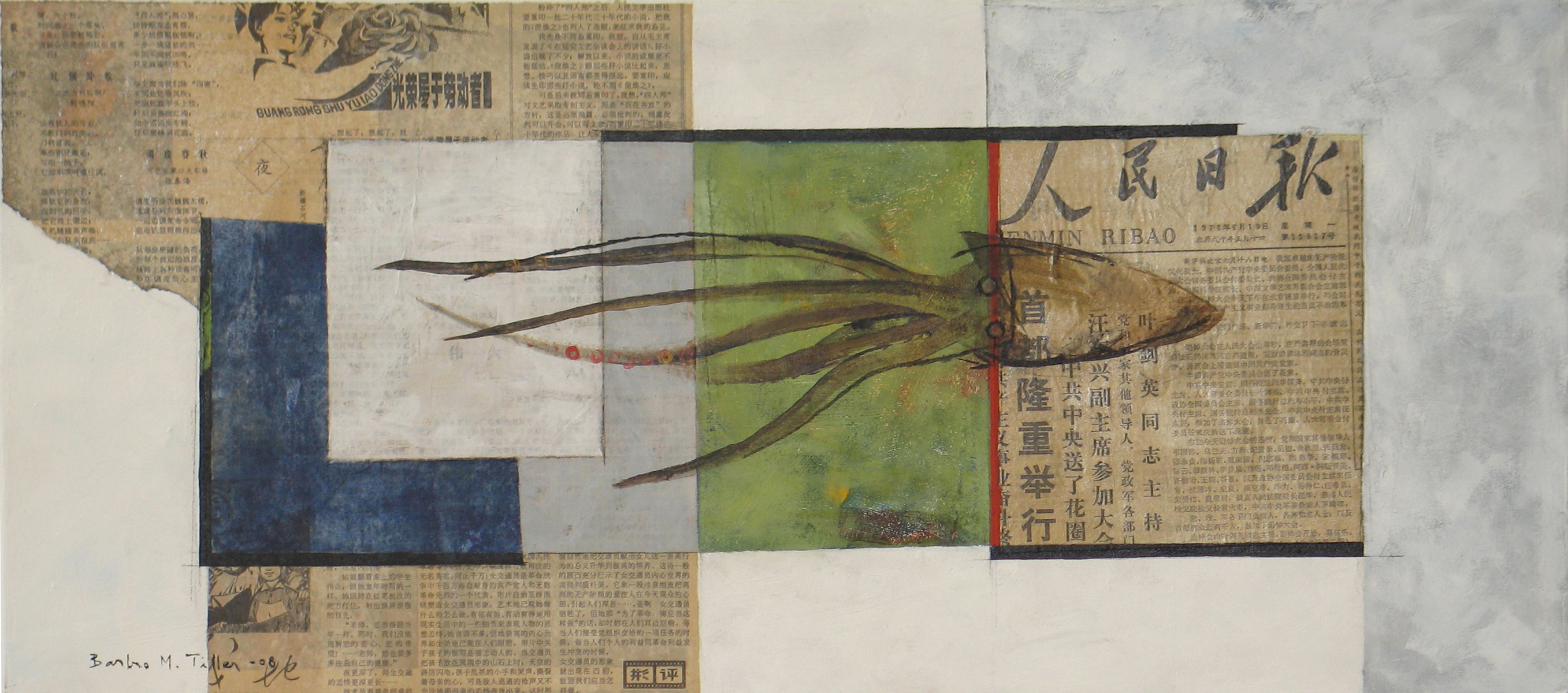 Barbro Maria Tiller - "Youyu", papir og akryl på plate 2008, 33 x 74 cm